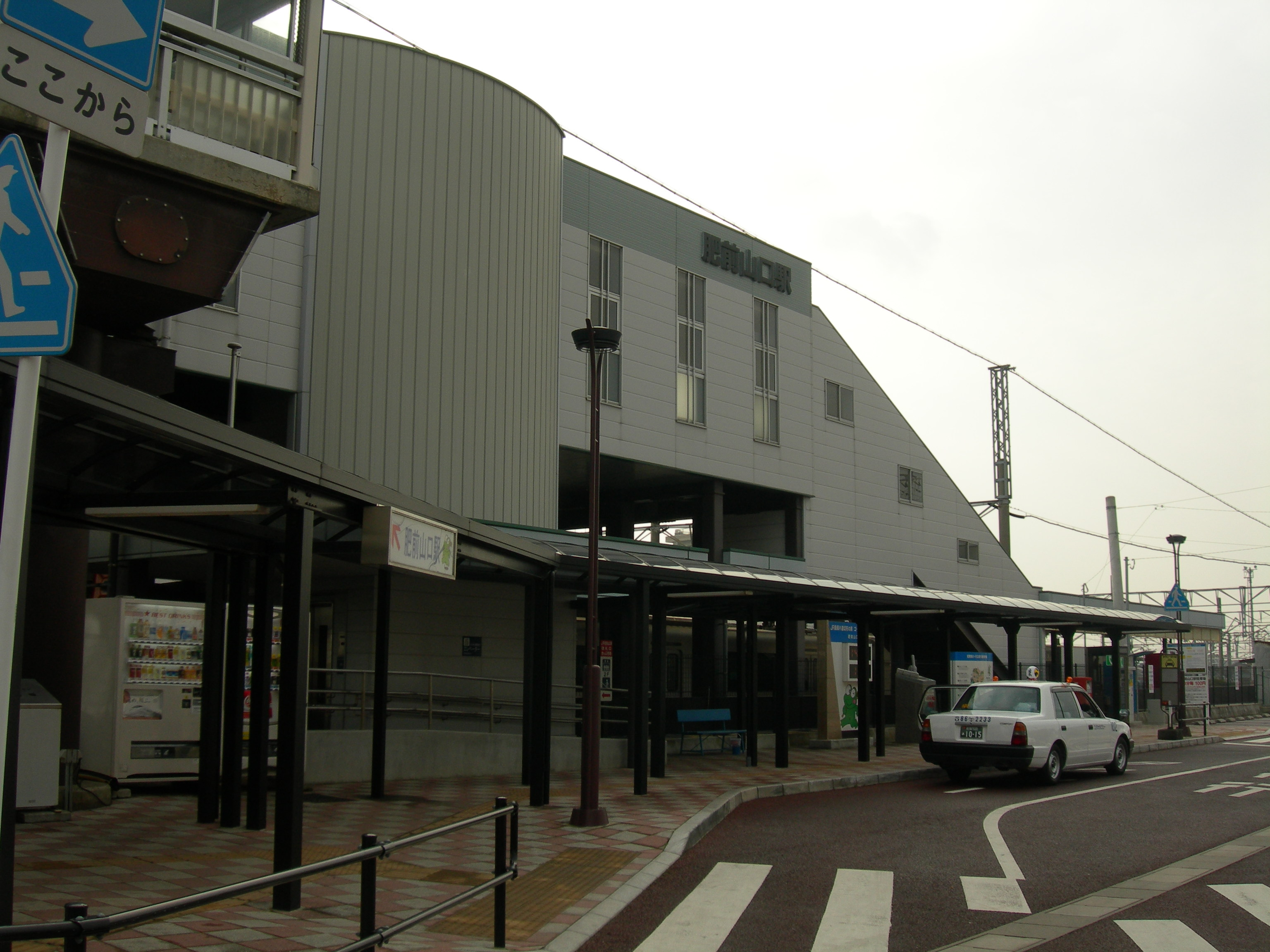 肥前山口駅（北口）